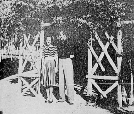 Tito Lívio Fleury Martins e Norma Lopes em uma das primeiras cenas do filme Terra e Espada, da Cia. Americana de Filmes.